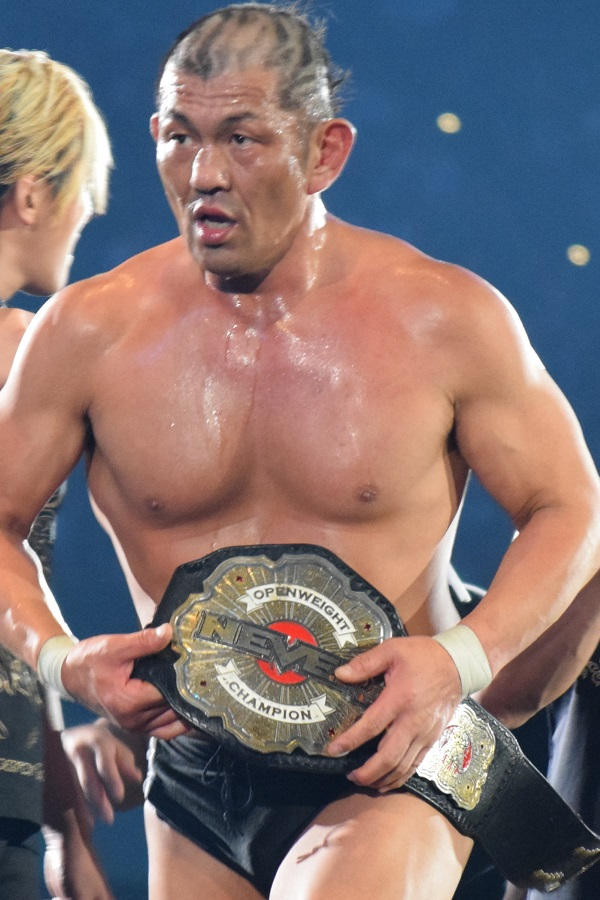 2017年6月11日 大阪城ホール「DOMINION 6.11 in OSAKA-JO HALL」 鈴木みのる